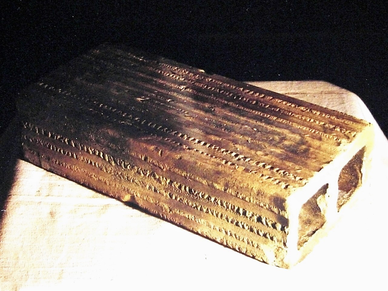 アルフレッドジェラール製造 有孔煉瓦 明治初期の製造